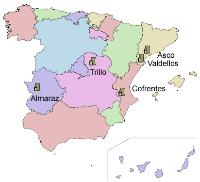 Mapa Espanys situació de les centrals nuclears